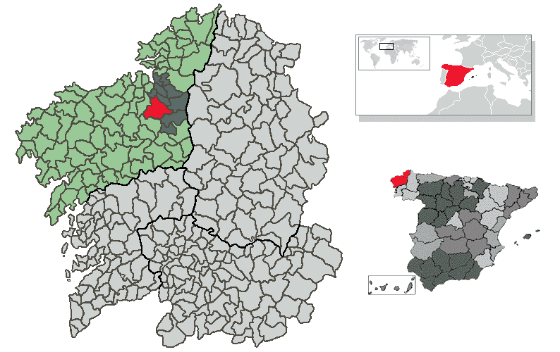 Mapas de localización de Oza-Cesuras